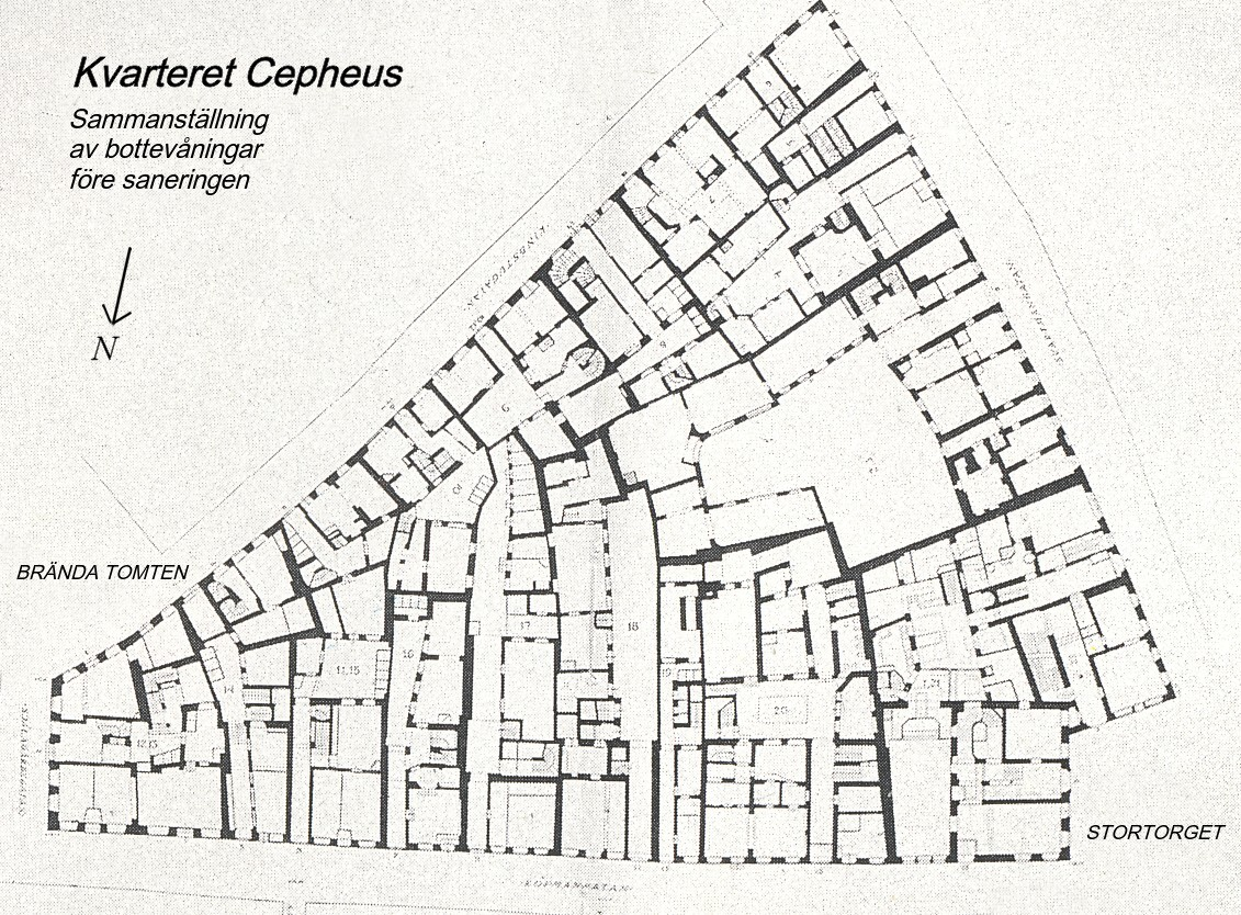 Kvarteret Cepheus i Gamla stan, Stockholm, plan av bottenvåningar före saneringen